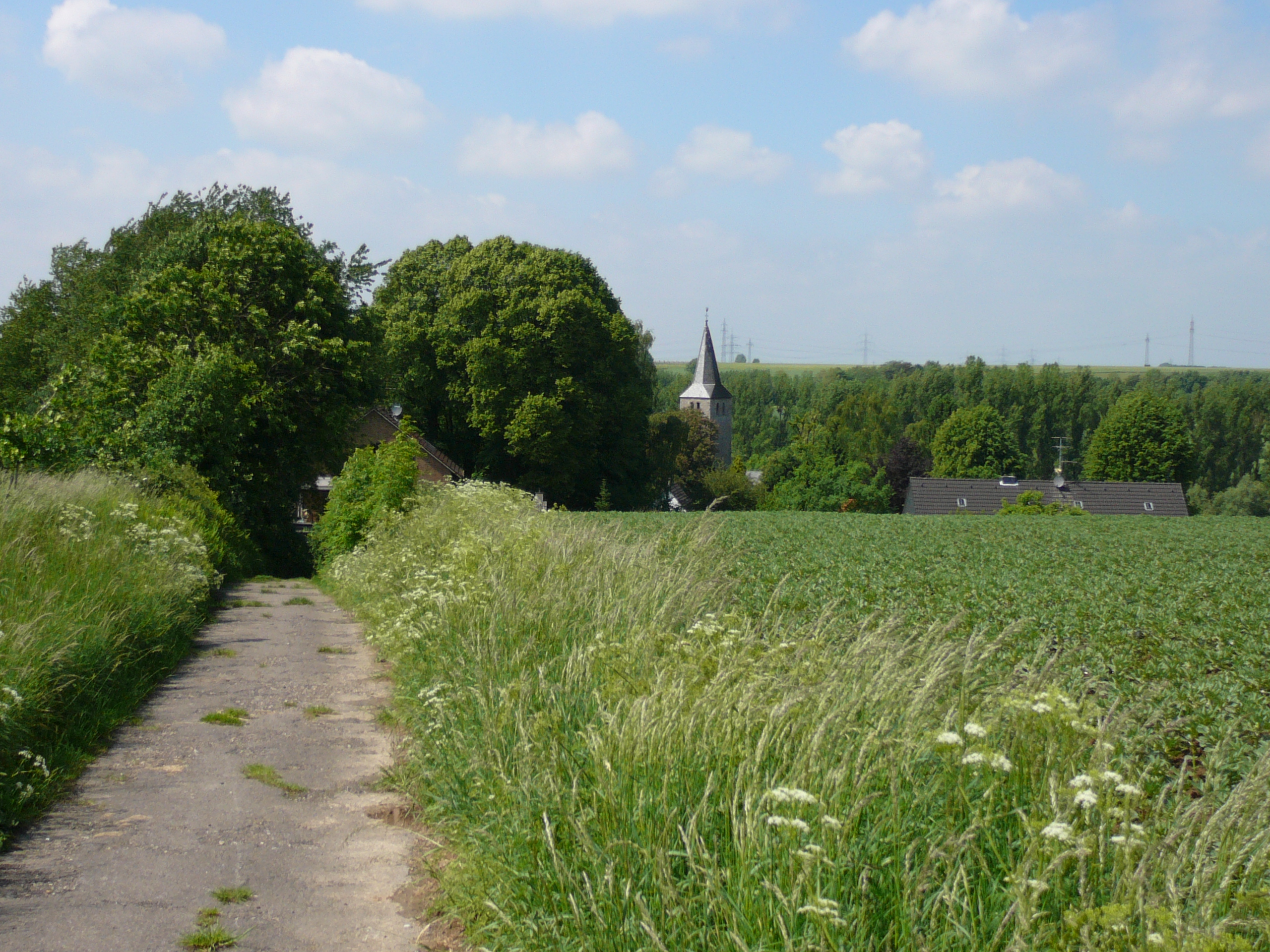 Blick auf Schöller, Wuppertal